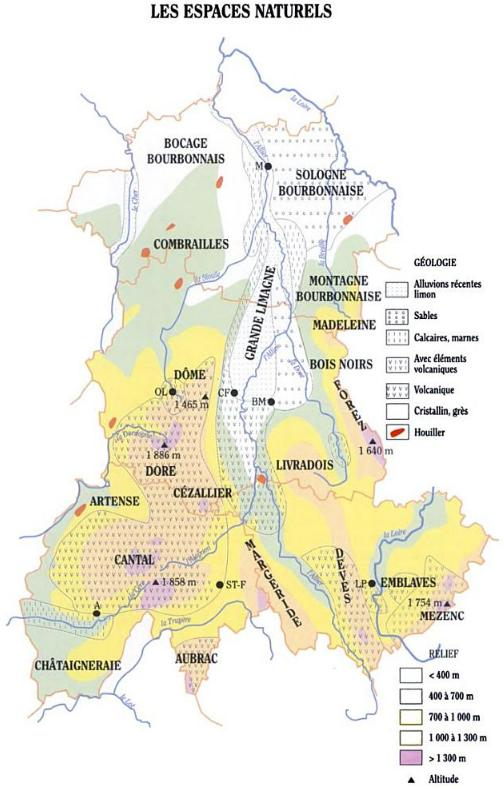 Carte des espaces naturels de l'Auvergne